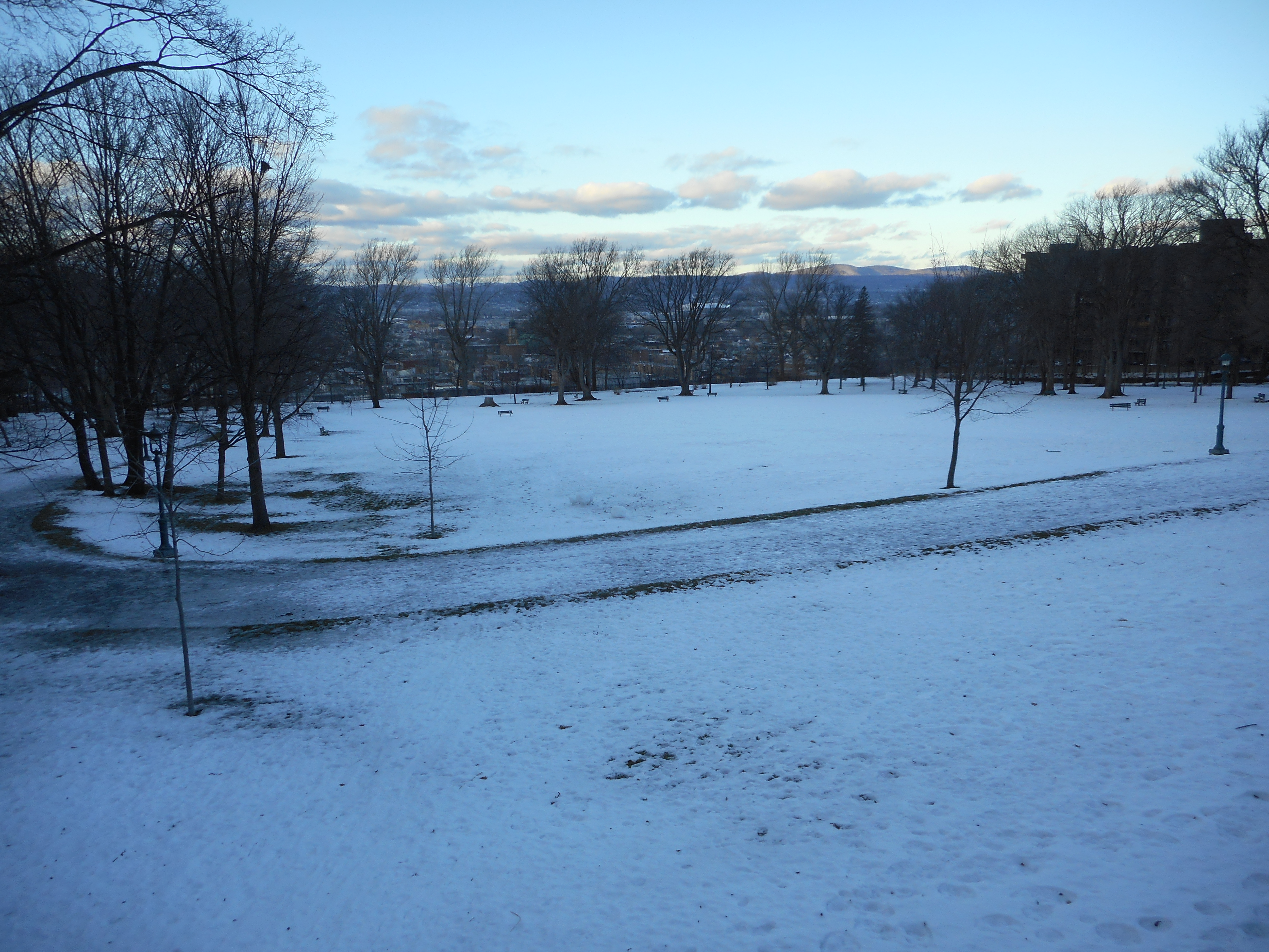 Le parc des Braves est un parc de Québec situé sur le chemin Sainte-Foy, face à l'avenue des Braves, à l'endroit où a eu lieu la bataille de Sainte-Foy en 1760. quebecplus.ca